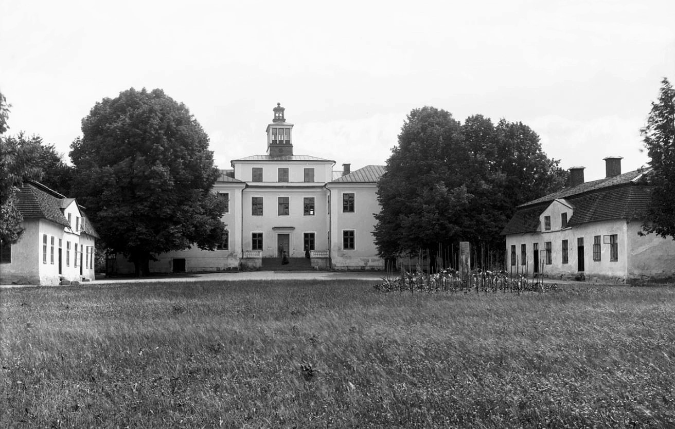 Enköping, Svinnegarns socken, Haga slott